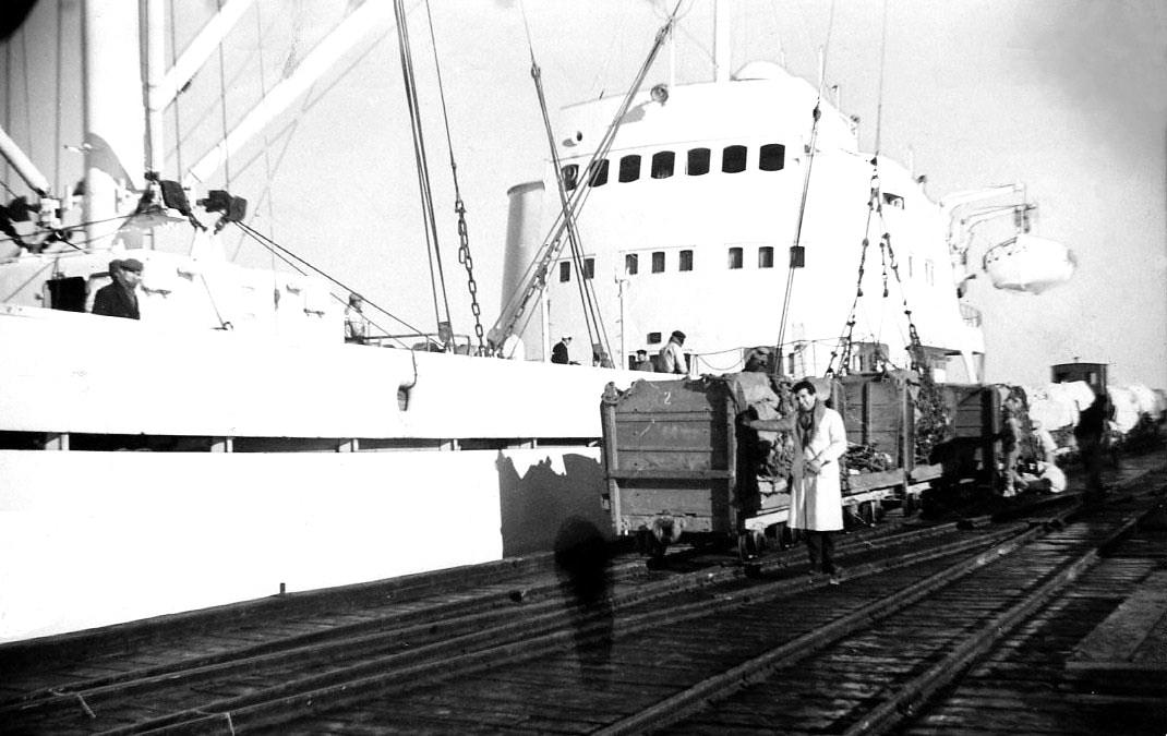 El barco Ursula H amarrado en Puerto Cuatreros, recibiendo cargamento de productos elaborados en la Planta de CAP Cuatreros con destino a Europa